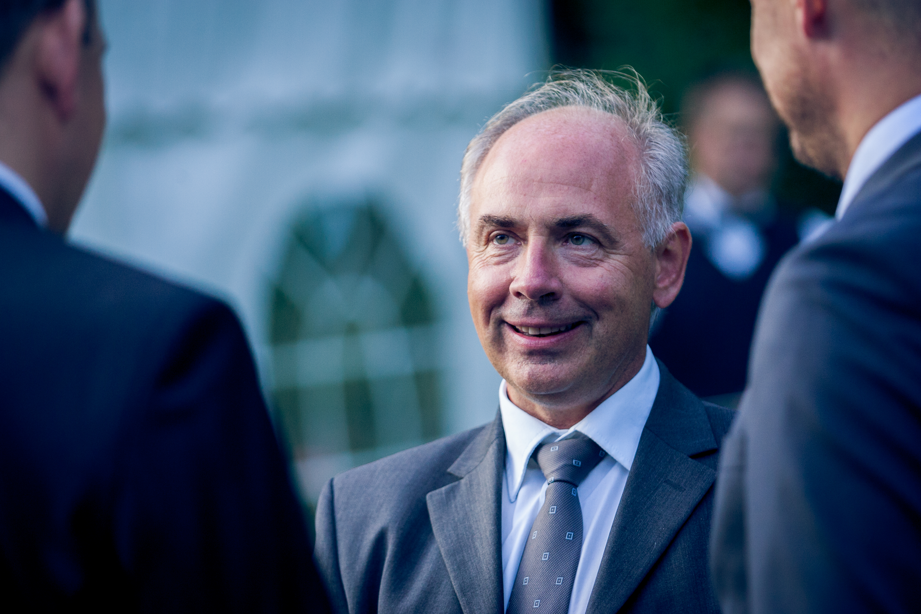 Clyde Kull, Eesti Euroopa Liidu esinduse asejuht, suursaadikute vastuvõtul Kadriorus.